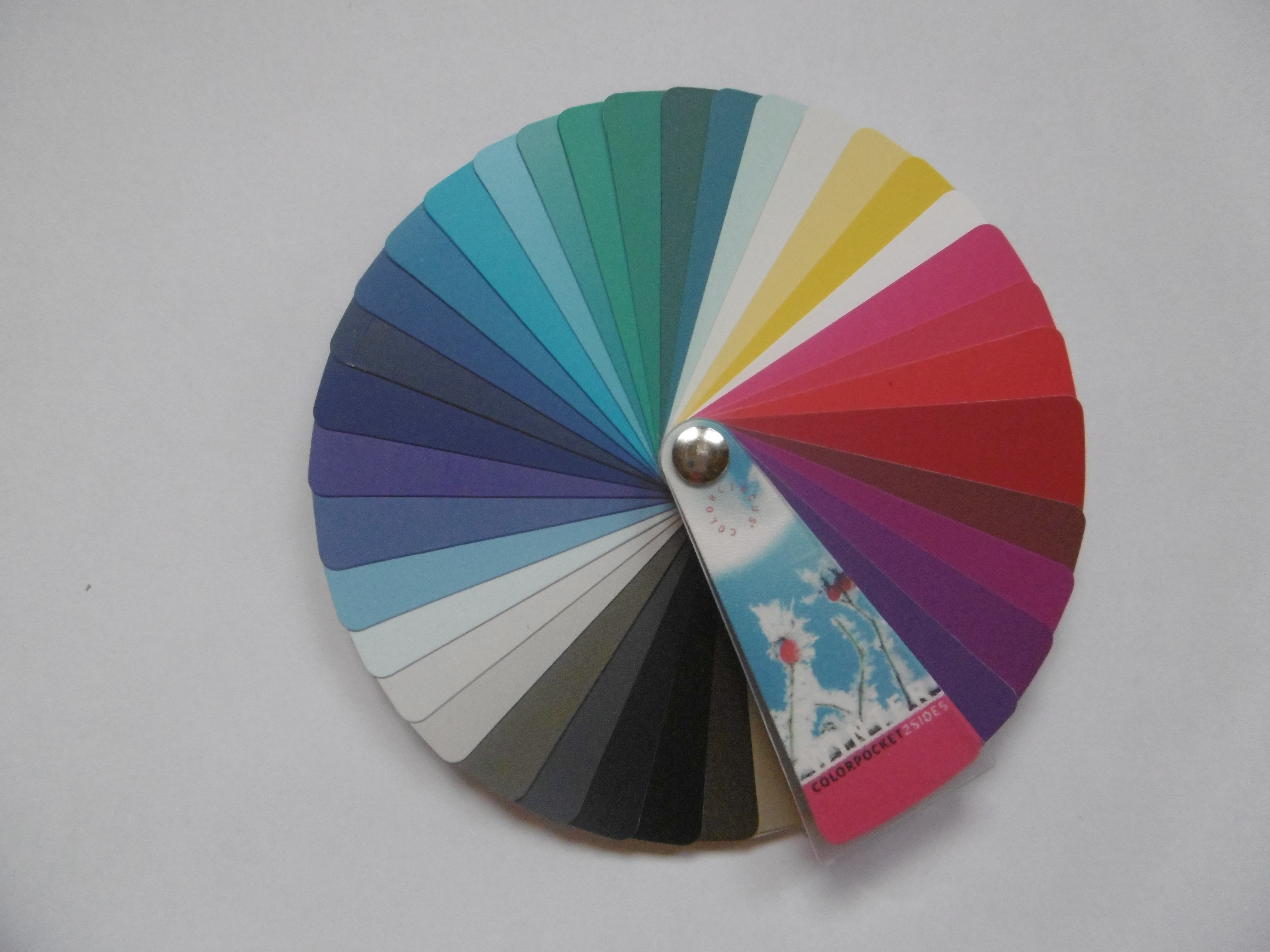 Fabskala "Winterfarben" - Farbberatung, Farbtypenlehre